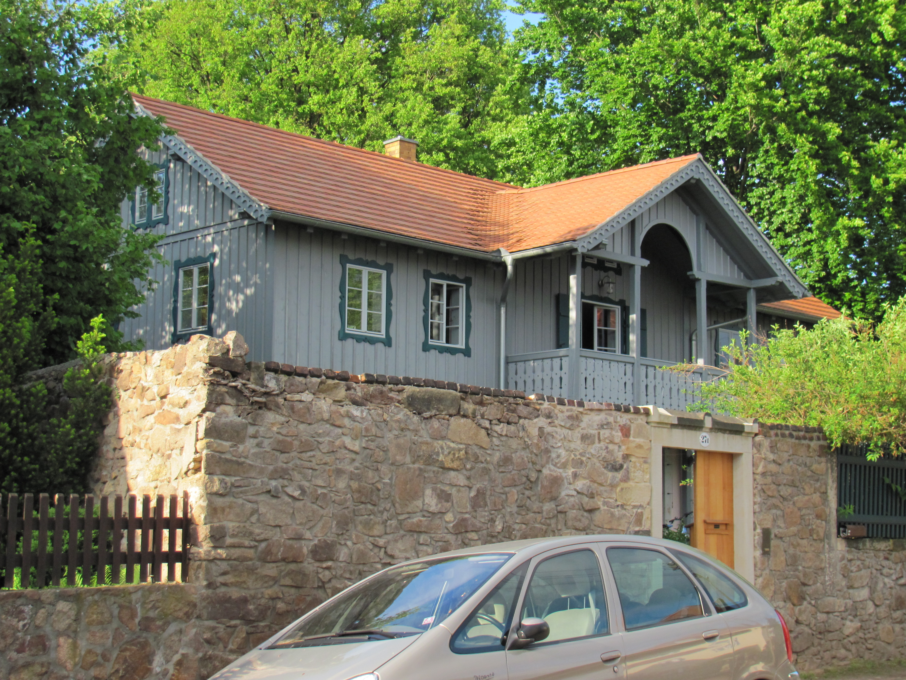 Radebeul Landhaus Anna Zischer